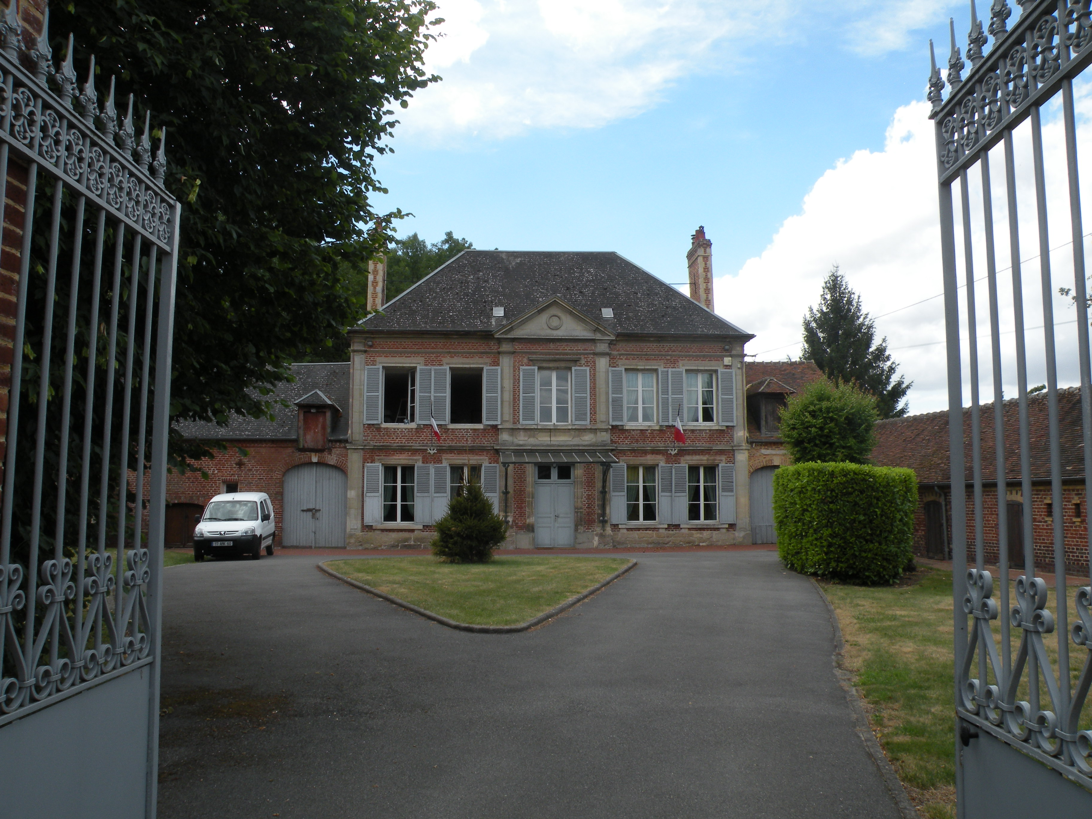 mairie Le Déluge (Oise)